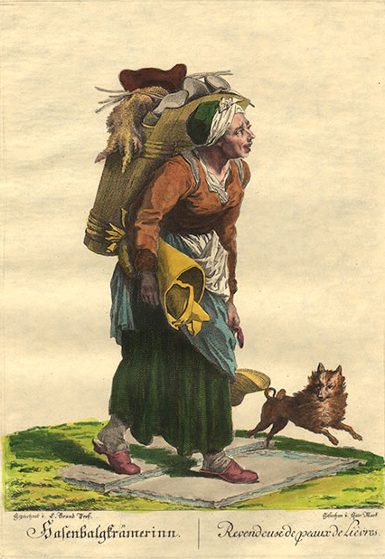 Hasenbalgkrämerinn Das männliche Gegenstück zur Hasenbalgkrämerin war der "Hasenhäutlmann". Sie standen am Ende der Kette der Wildverwertung, die wegen der nicht vorhandenen Kühlmöglichkeiten rasch erfolgen musste. Handkolorierter, originaler Kupferdruck aus dem ersten Drittel des 20. Jahrhunderts nach einer Grafik aus dem Jahr 1775.